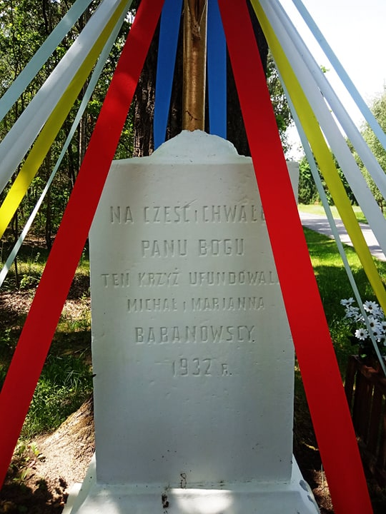 Leszczyny, figura z 1932 r.